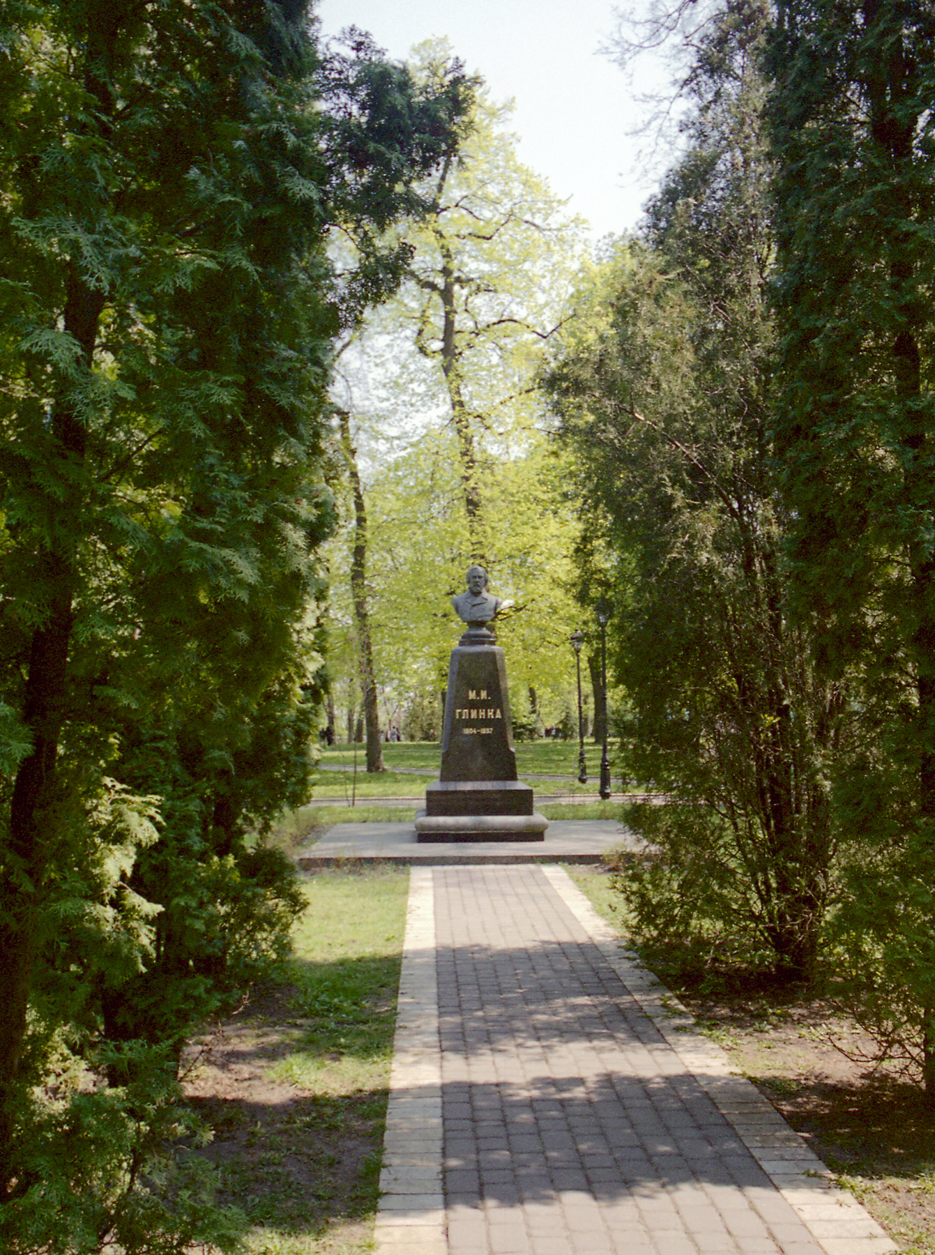 Allée to M.I.Glinka monument in Mariinski park, Kiev, Ukraine